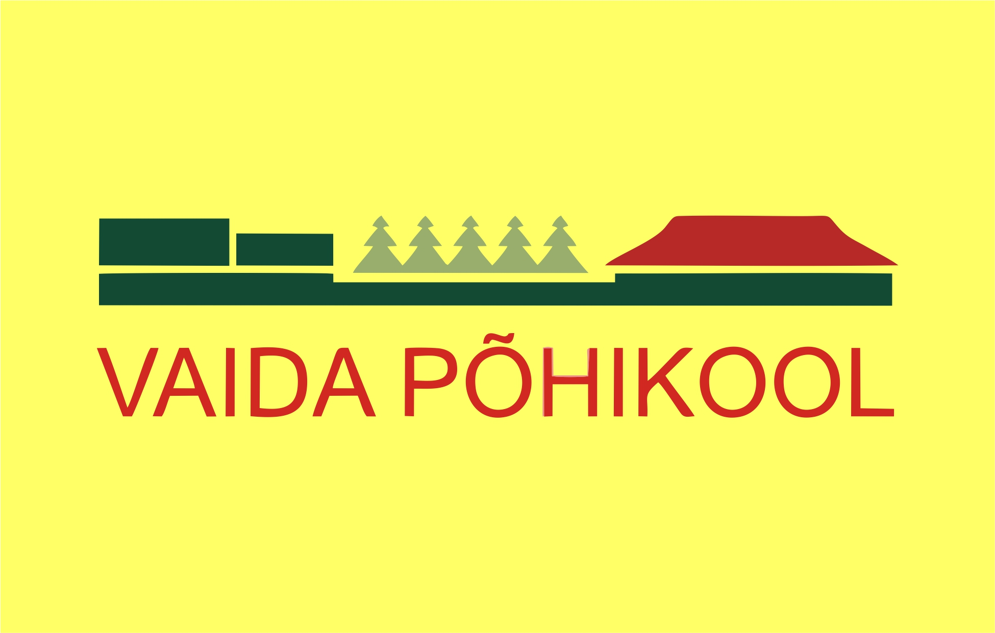 Vaida kooli lipp